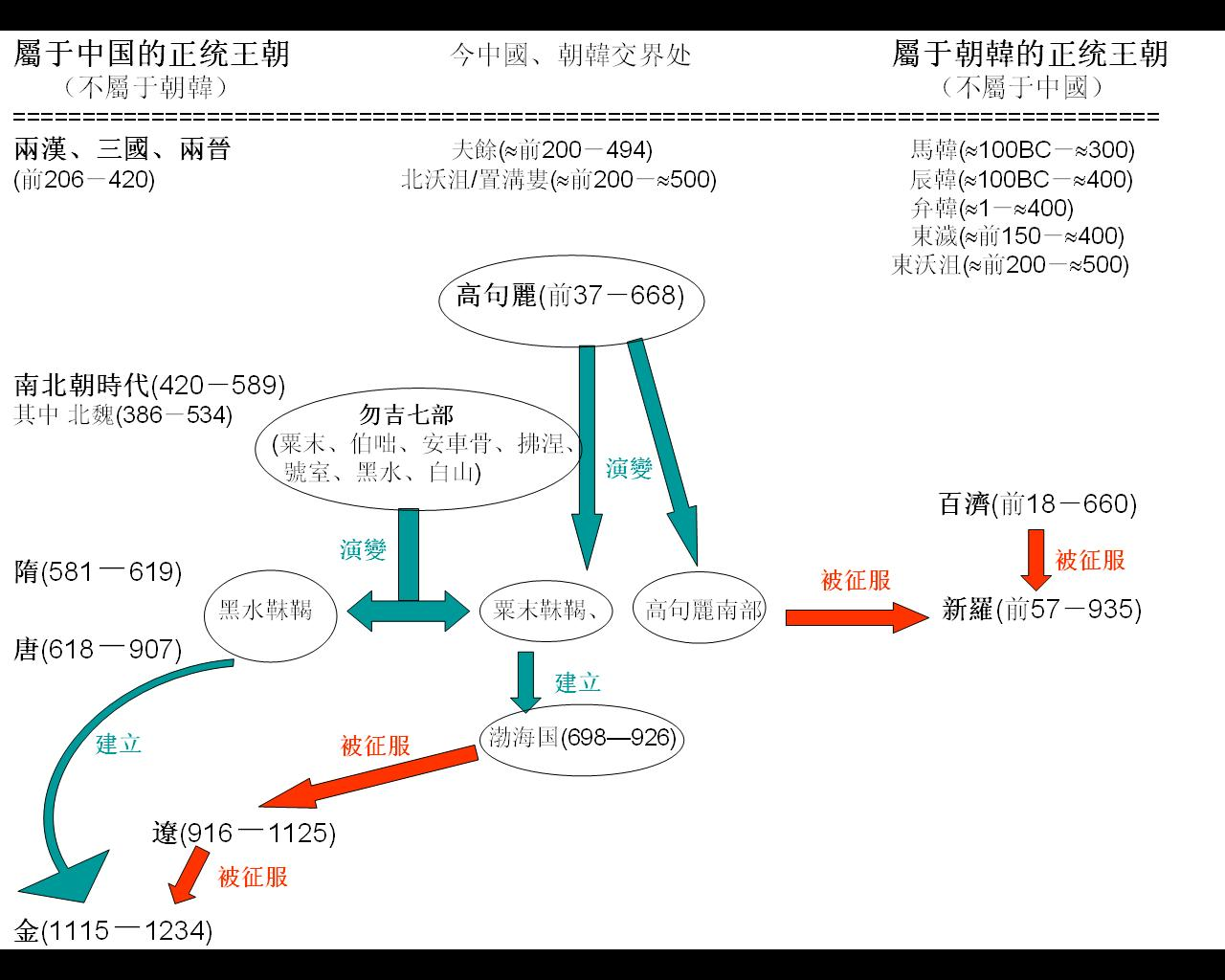 高句麗和中國、朝韓國度關系圖